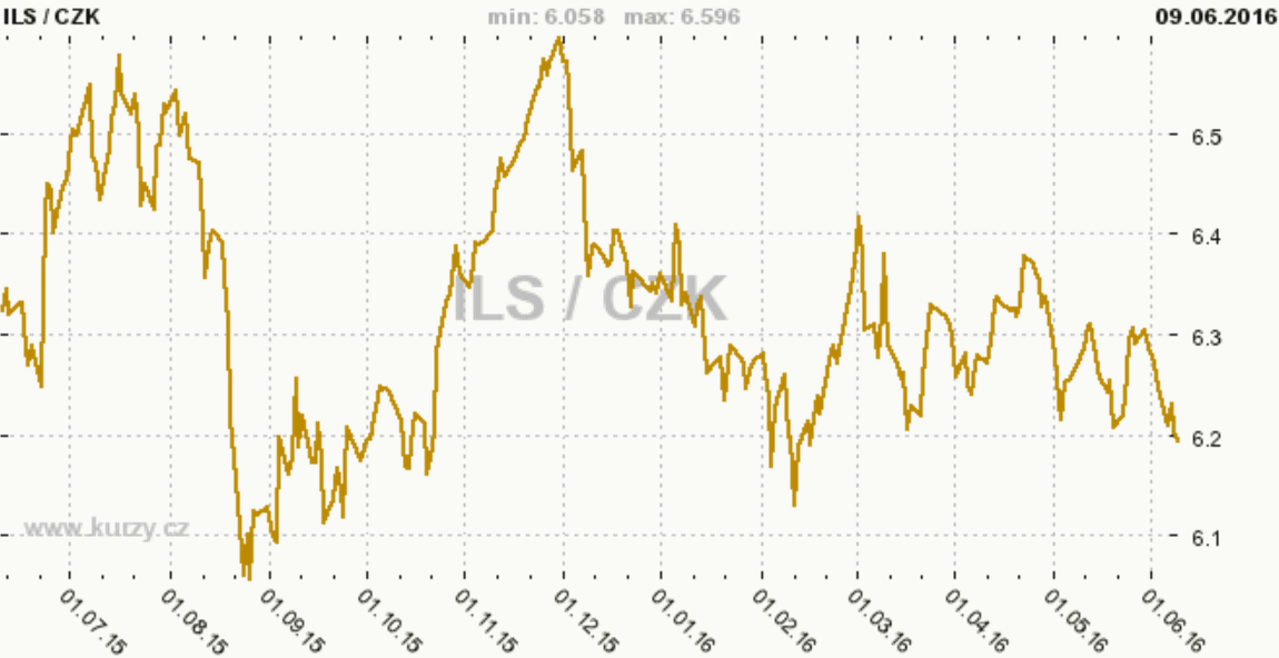 Kurzy měn - Izraelský šekel ILS